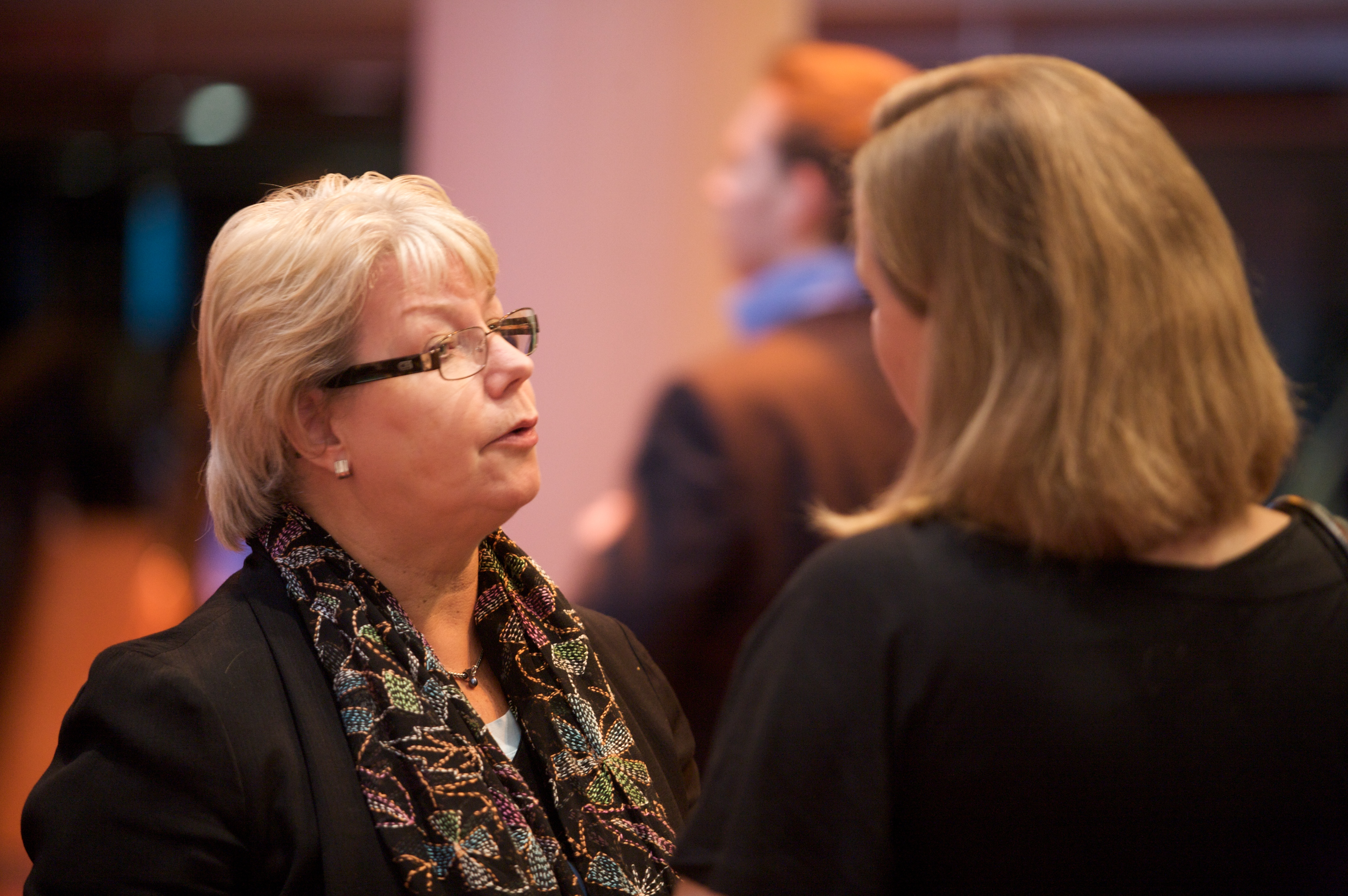 Magda Berndsen, Tweede Kamerlid voor D66 op een partijcongres in BRede (2009)